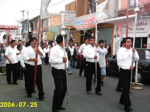 Foto del cuerpo de fiscales de Santa Ana Chiautempan, Tlaxcala, mejor conocido como ayuntamiento religioso, atrás, se aprecia la imagen de Santa Ana en Procesión por las principales calles de su pueblo